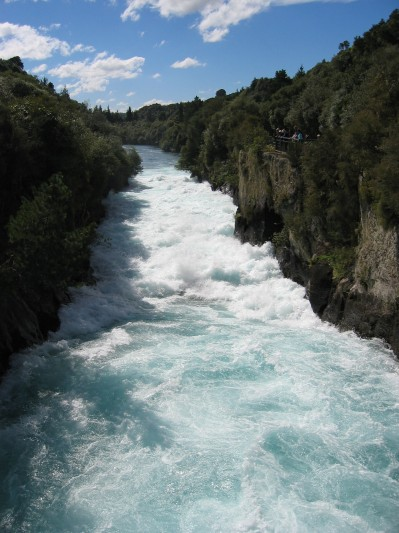 Huka Wasserfälle, Taupo, Neuseeland